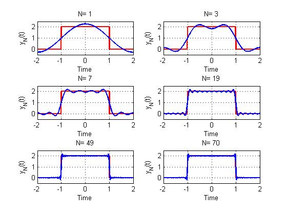 Fenomeno de Gibbs